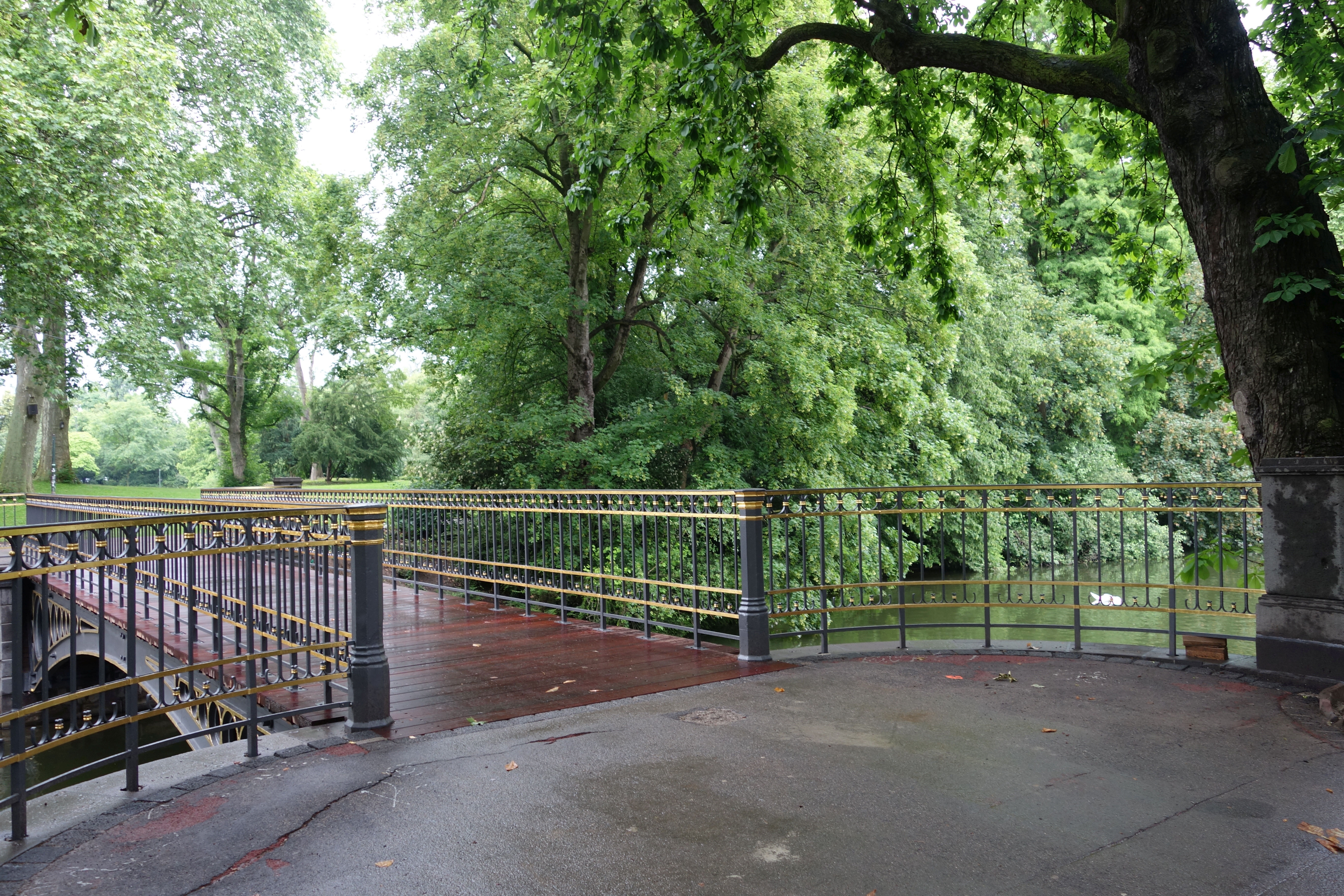 Goldene Brücke im Düsseldorfer Hofgarten, nach Ende der Renovierung, Juni 2016.